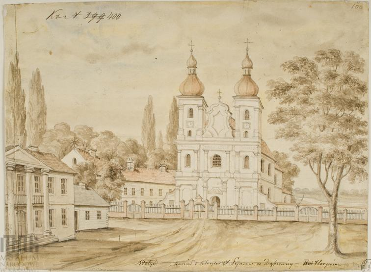 Дубровиця-Воробин. Костел і монастир піарів.